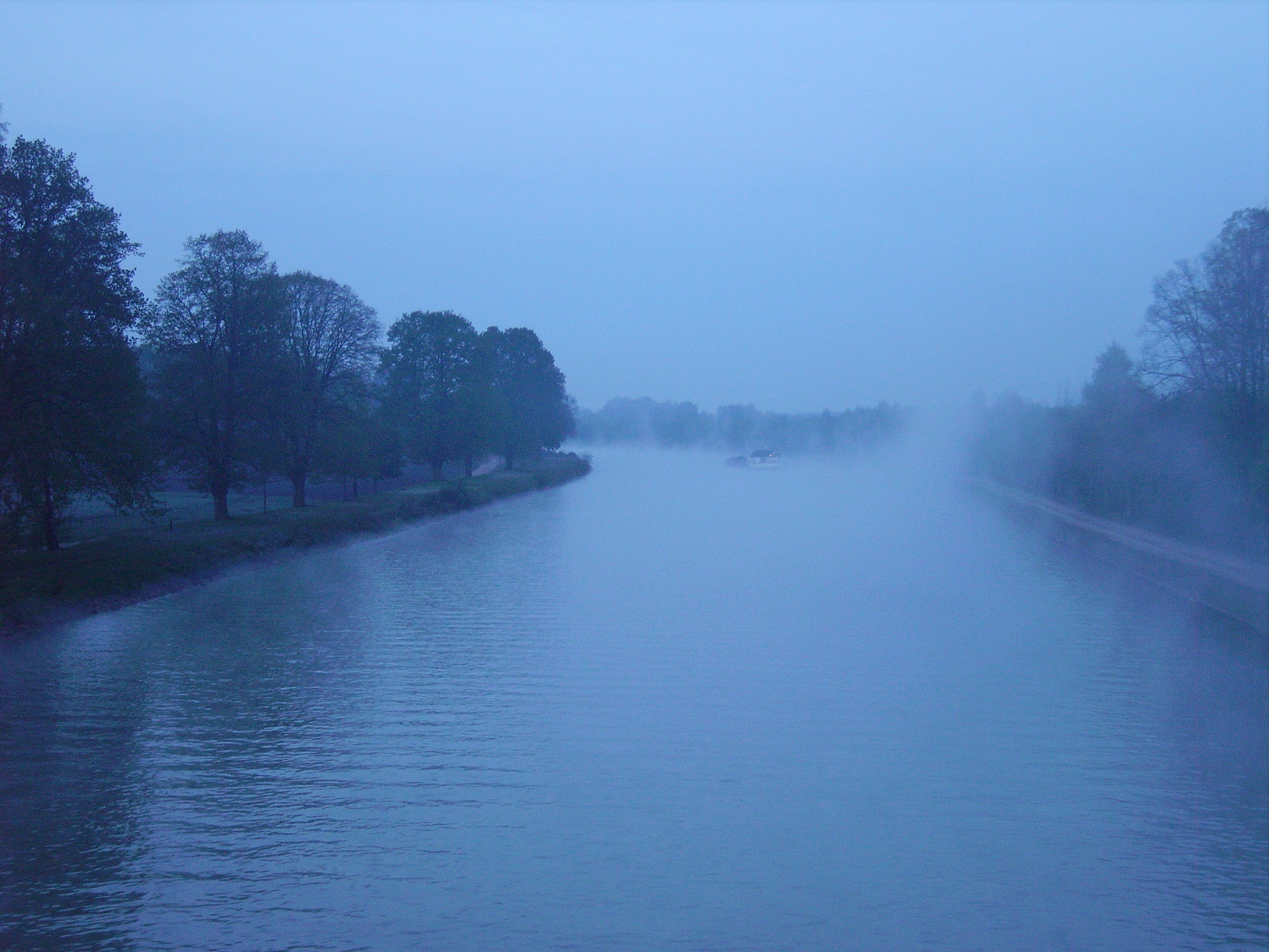 Kanal in Uffeln am Morgen